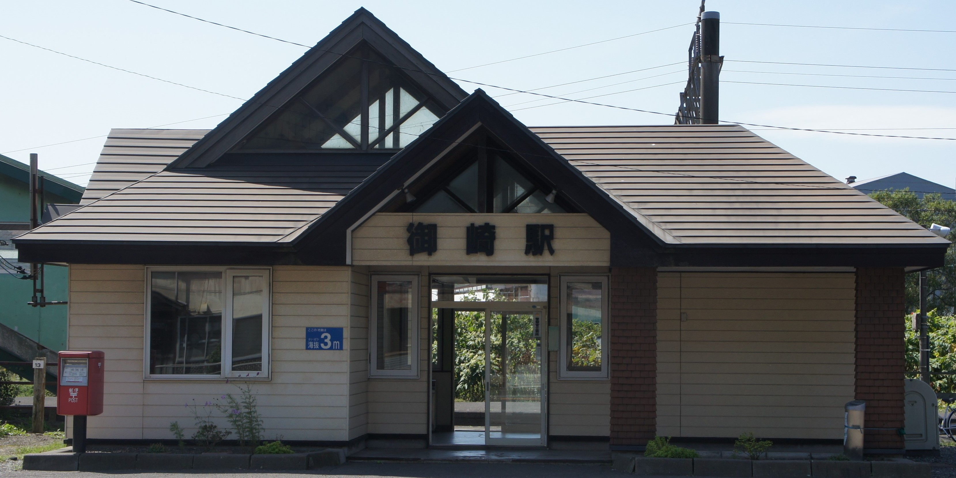 JR室蘭本線・御崎駅の駅舎